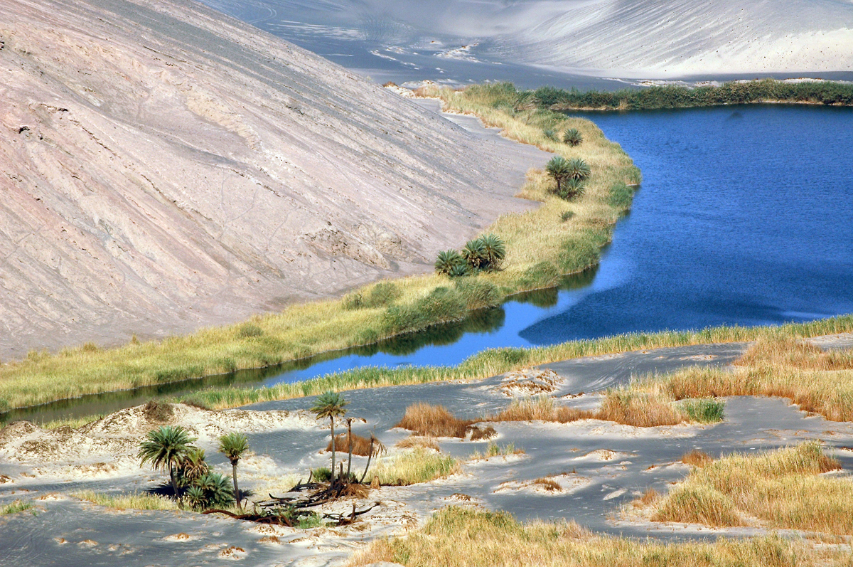 Grundwassersee in Wau-en-Namus Caldera